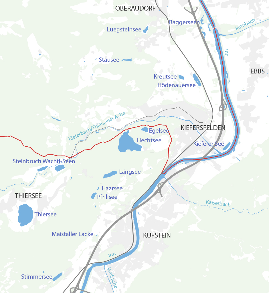 Alle Seen und wichtigen Flüsse/Bäche um Kufstein und Kiefersfelden, Stand 2016. Quelle